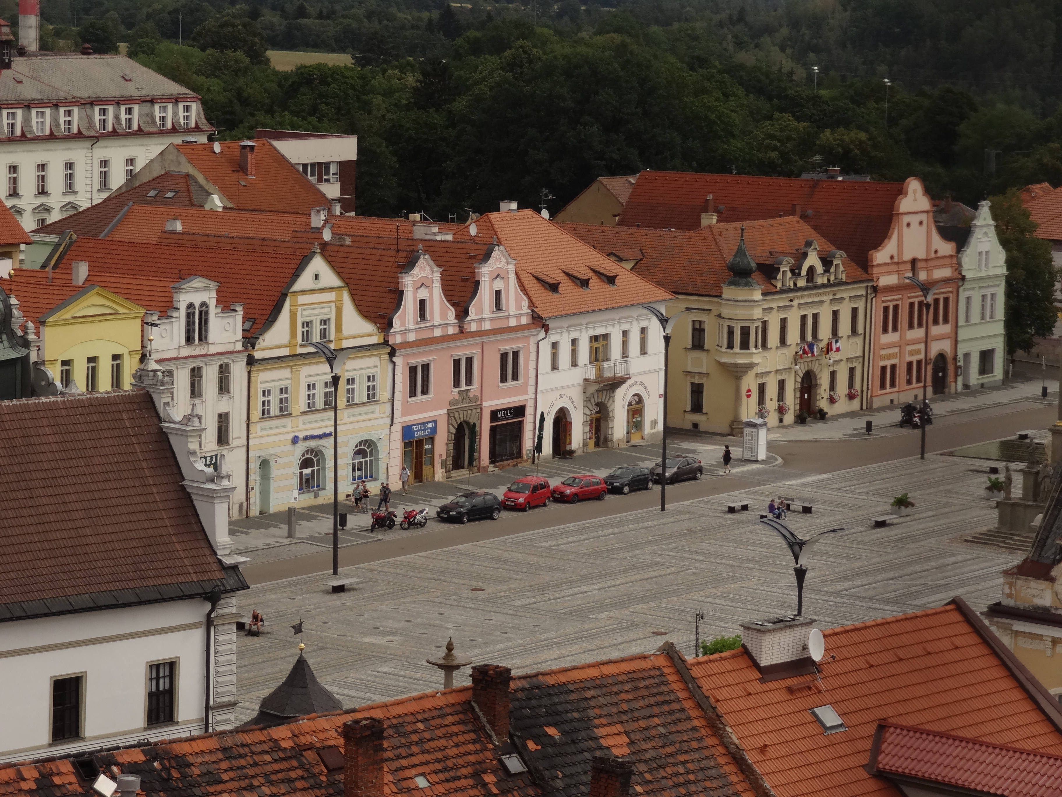 Stříbro - severní strana Masarykova náměstí z kostelní věže